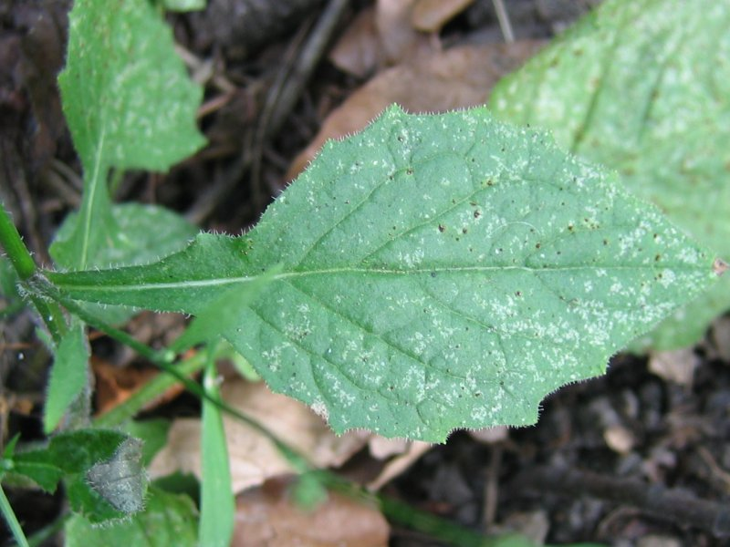 Gewöhnlicher Rainkohl (Lapsana communis), Rostock